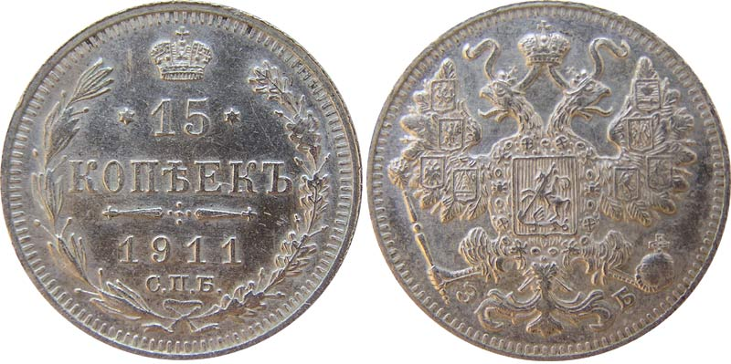 15 копеек 1911 года (Николай II, Ag)